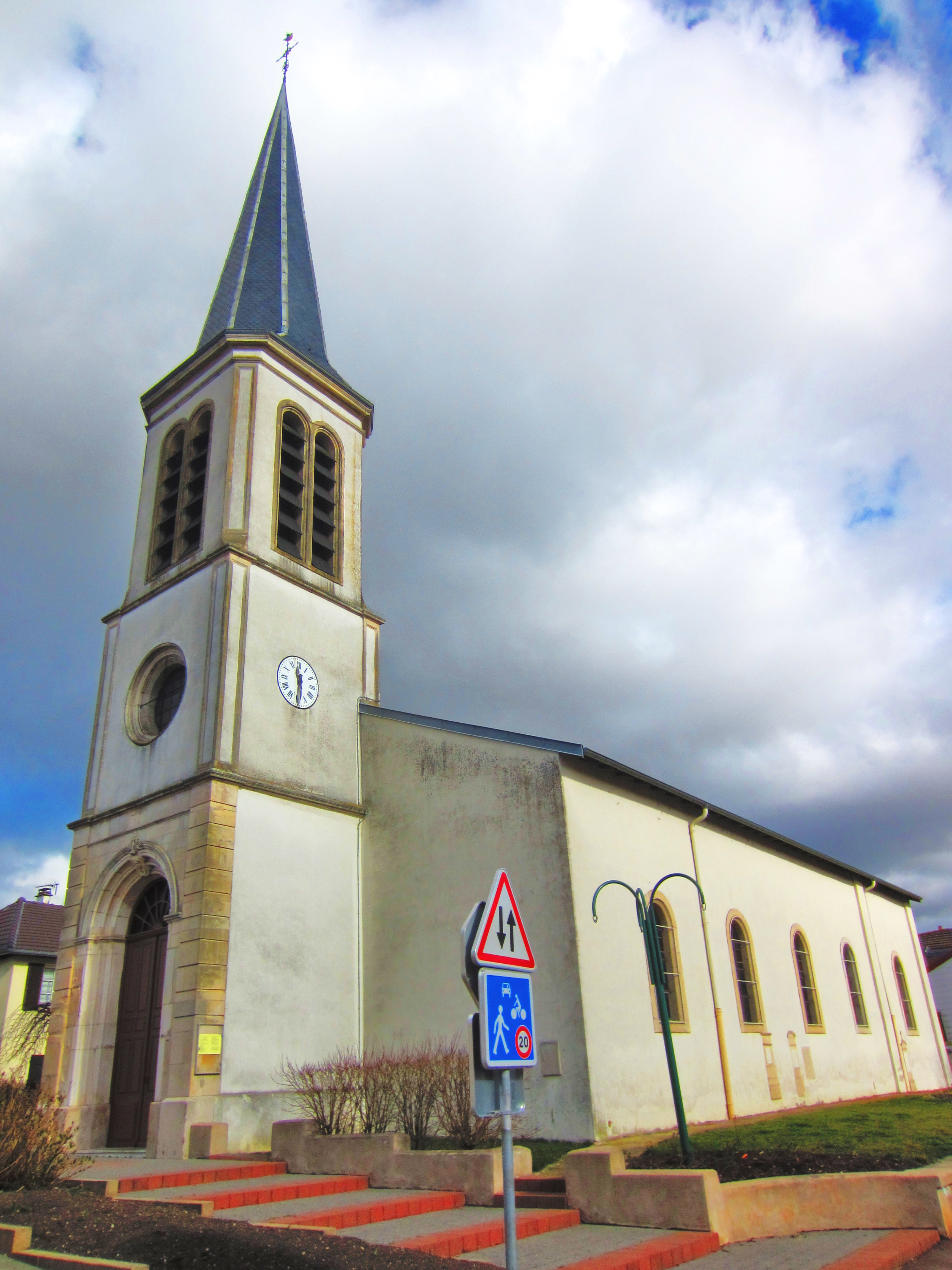 Saulxures eglise